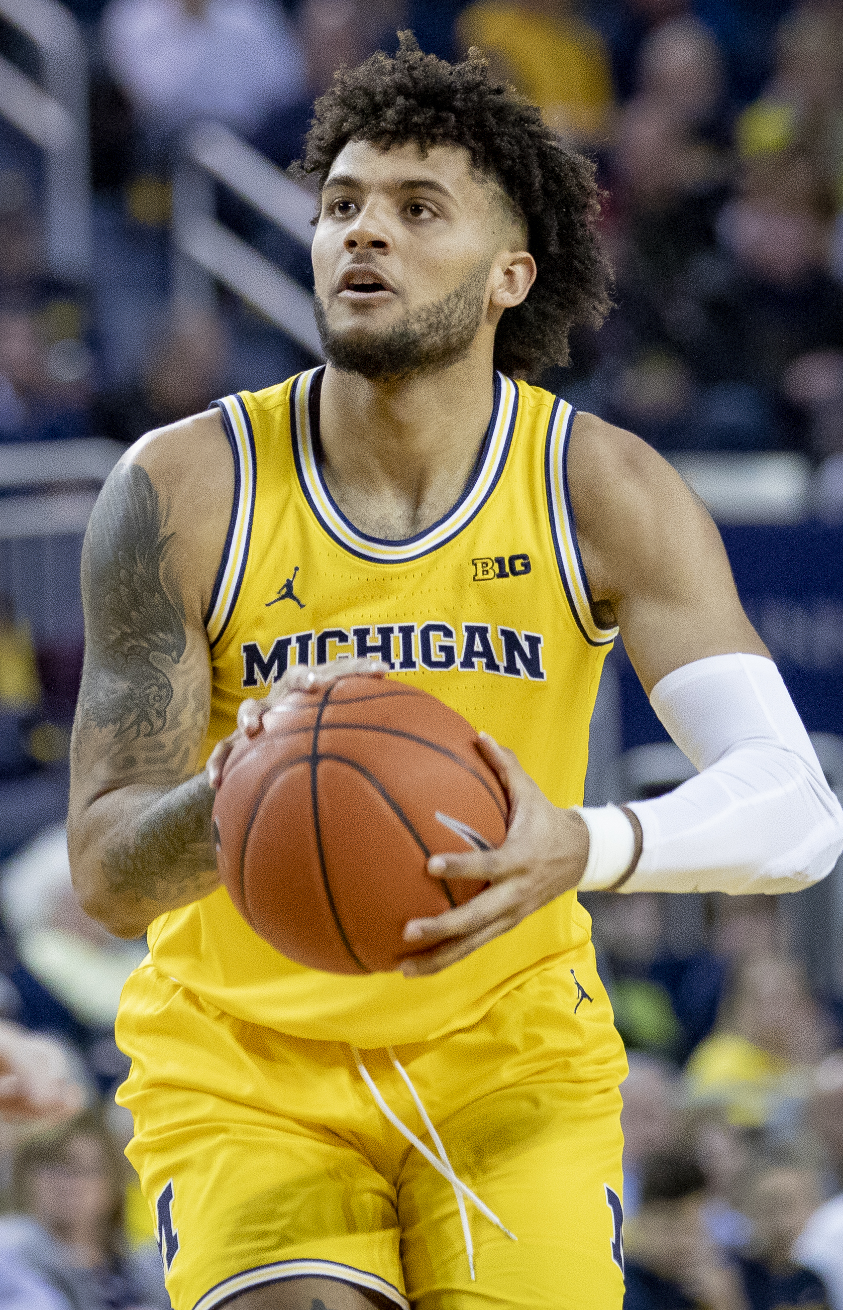 4O6A0688